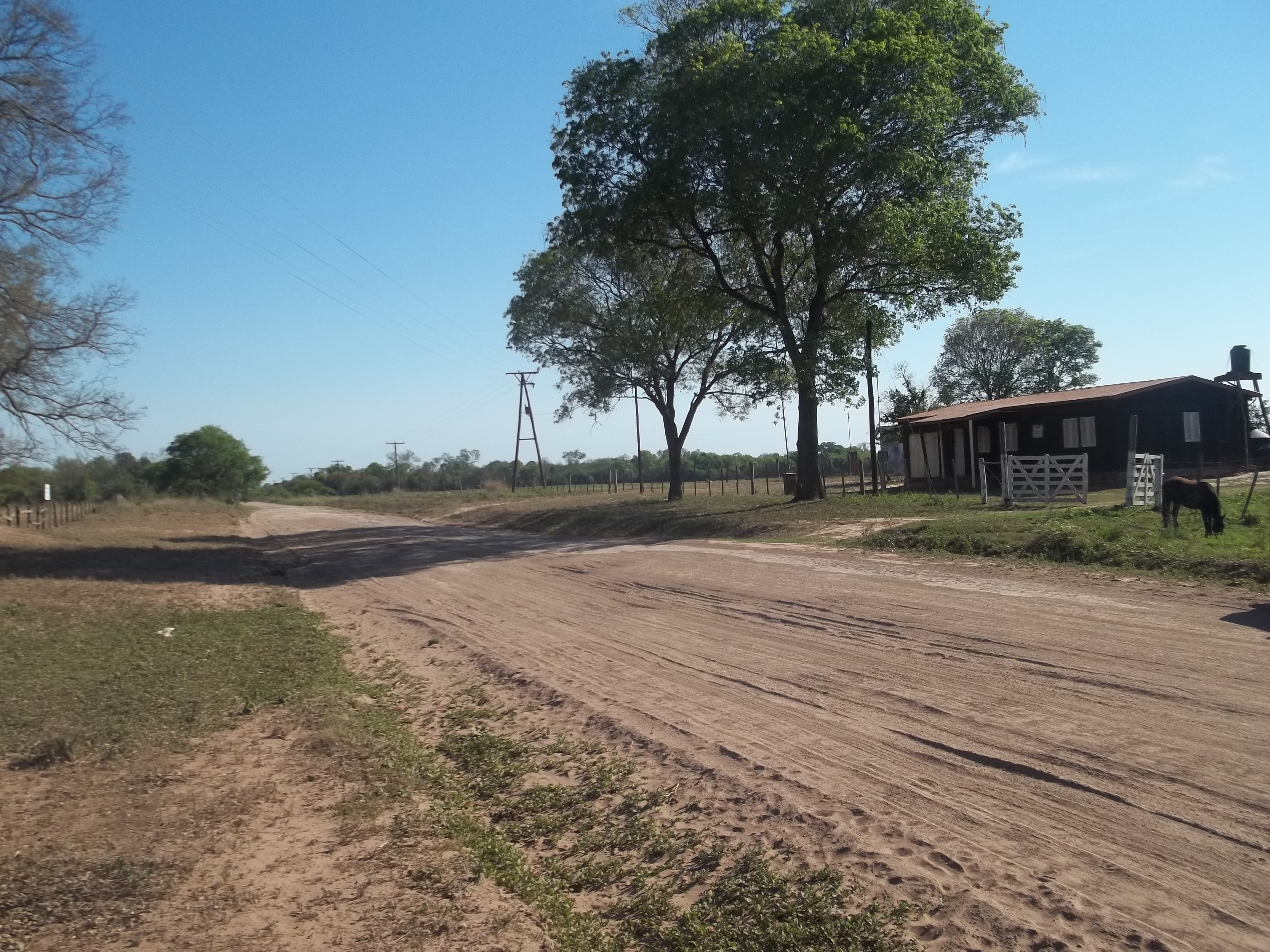 La Ruta Provincial 29 en el tramo que corta el emplazamiento de Concepción del Bermejo, se aprecia a la derecha la casa del cuidador de las ruinas, propiedad de la UNNE.